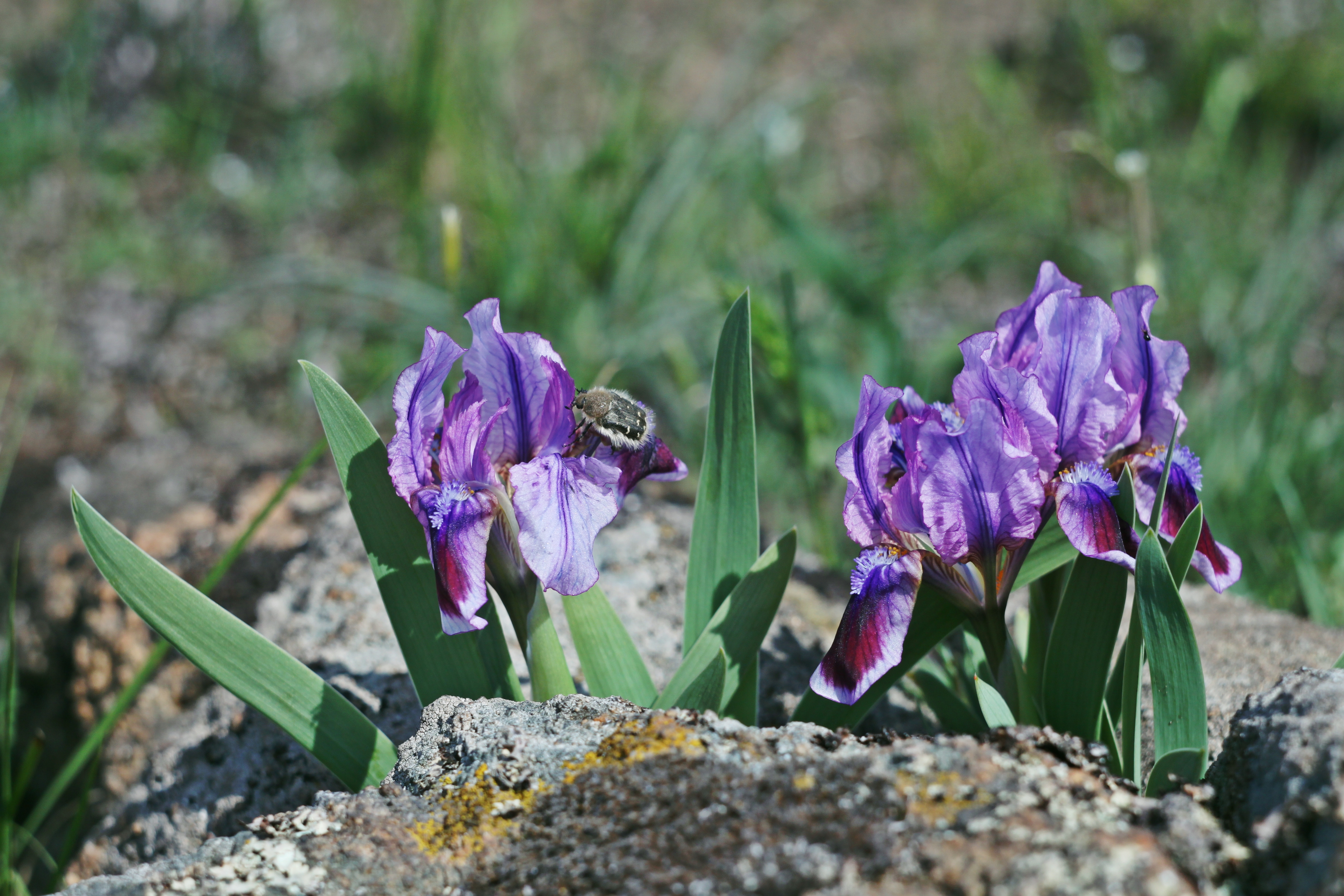 «Гранітно-степове Побужжя», Врадіївський, Кривоозерський, Первомайський, Арбузинський, Вознесенський, Доманівський, Братський р-ни